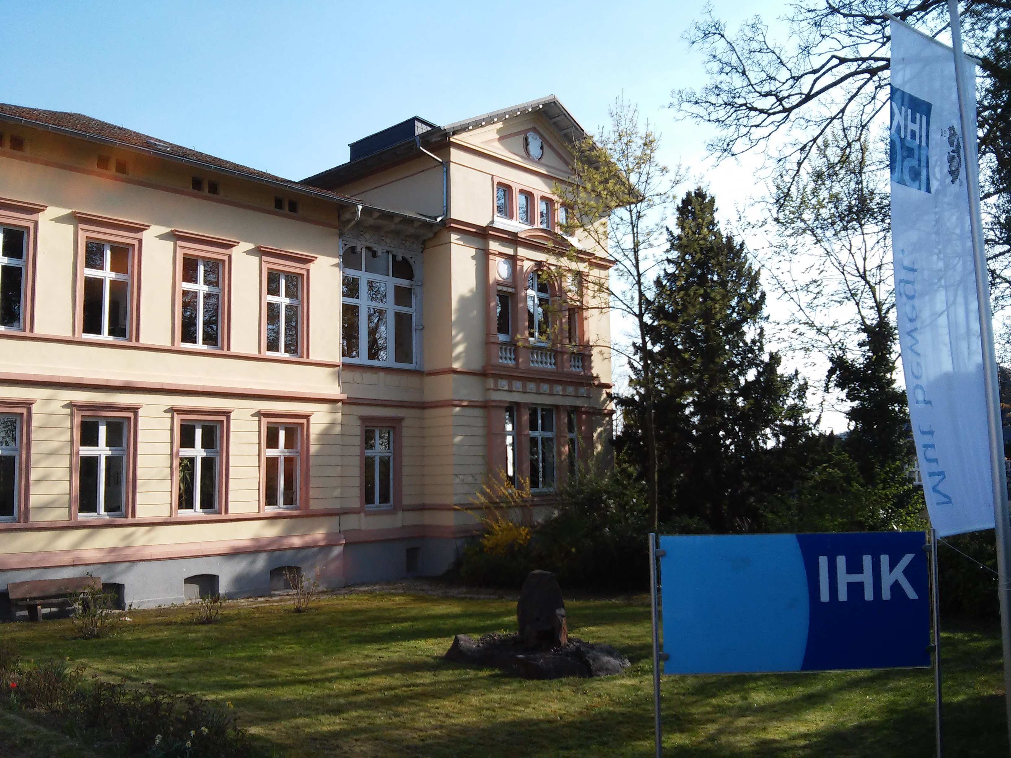 Sitz der IHK Lahn-Dill in Wetzlar